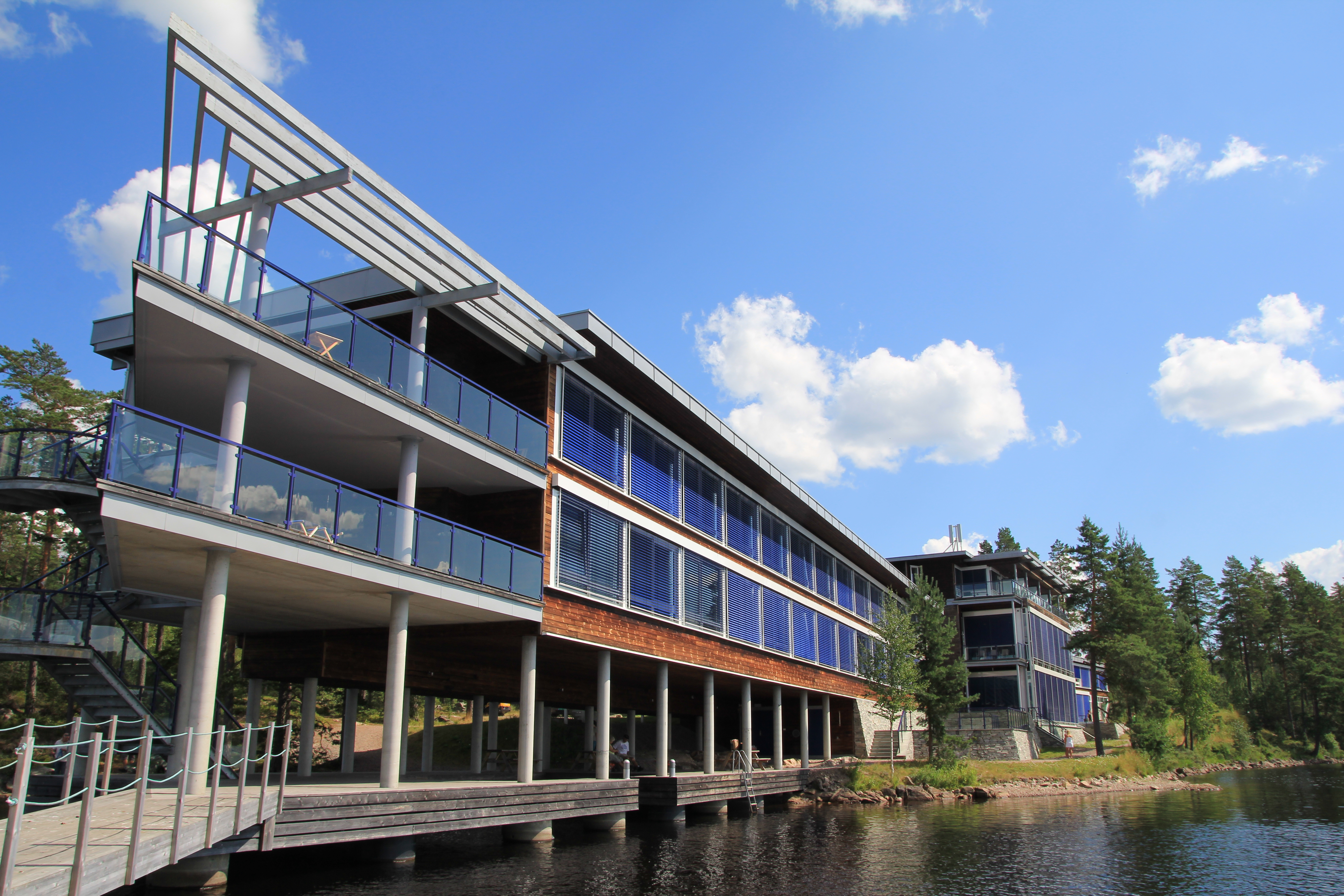 Rømskog Spa & Resort ligger ved vannet Vortungen på Rømskog (fra 2020 i Aurskog-Høland kommune).